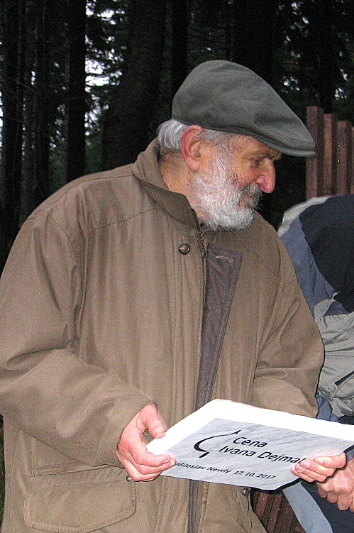 Miloslav Nevrlý při udělování ceny Ivana Dejmala u Prezidentské chaty v Jizerských horách